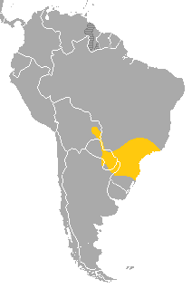 Ramphastos dicolorus